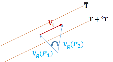 הרוח הגיאוסטרופית נושפת מאזור חם לאזור קר יותר. כיוון הרוח משתנה עם כיוון השעון עם העלייה בגובה.